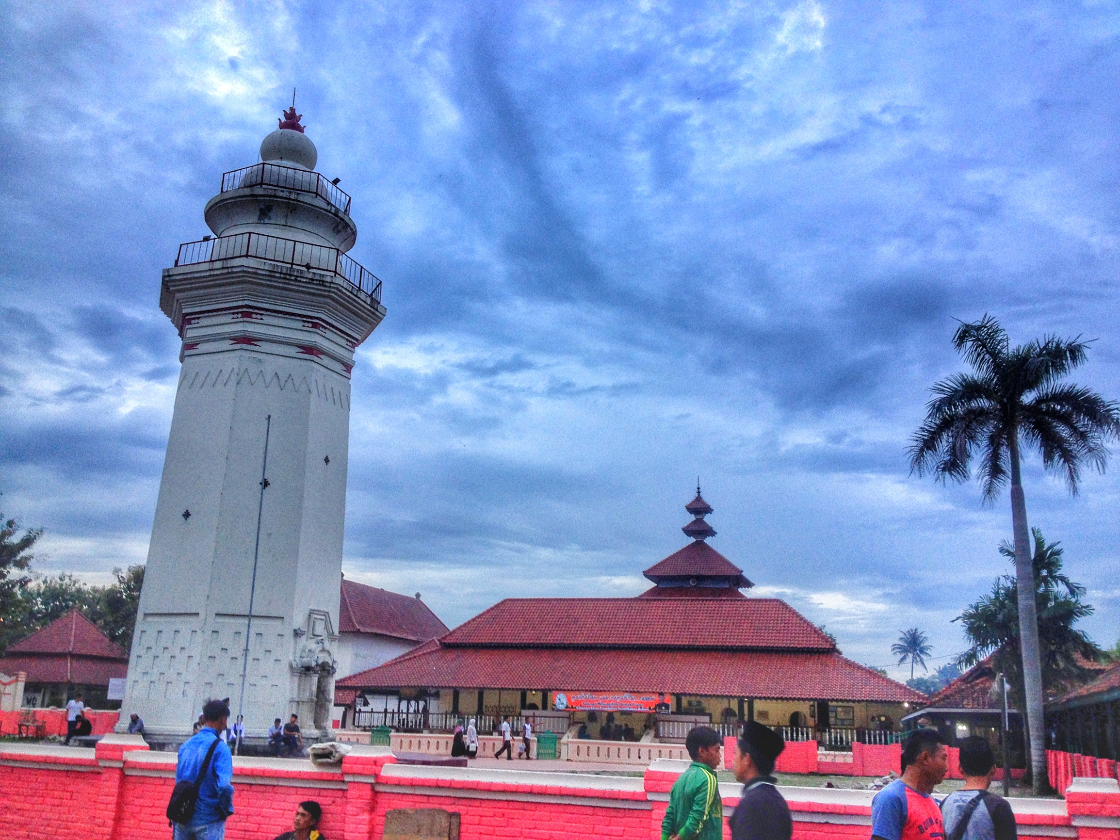 masjid agung banten lama